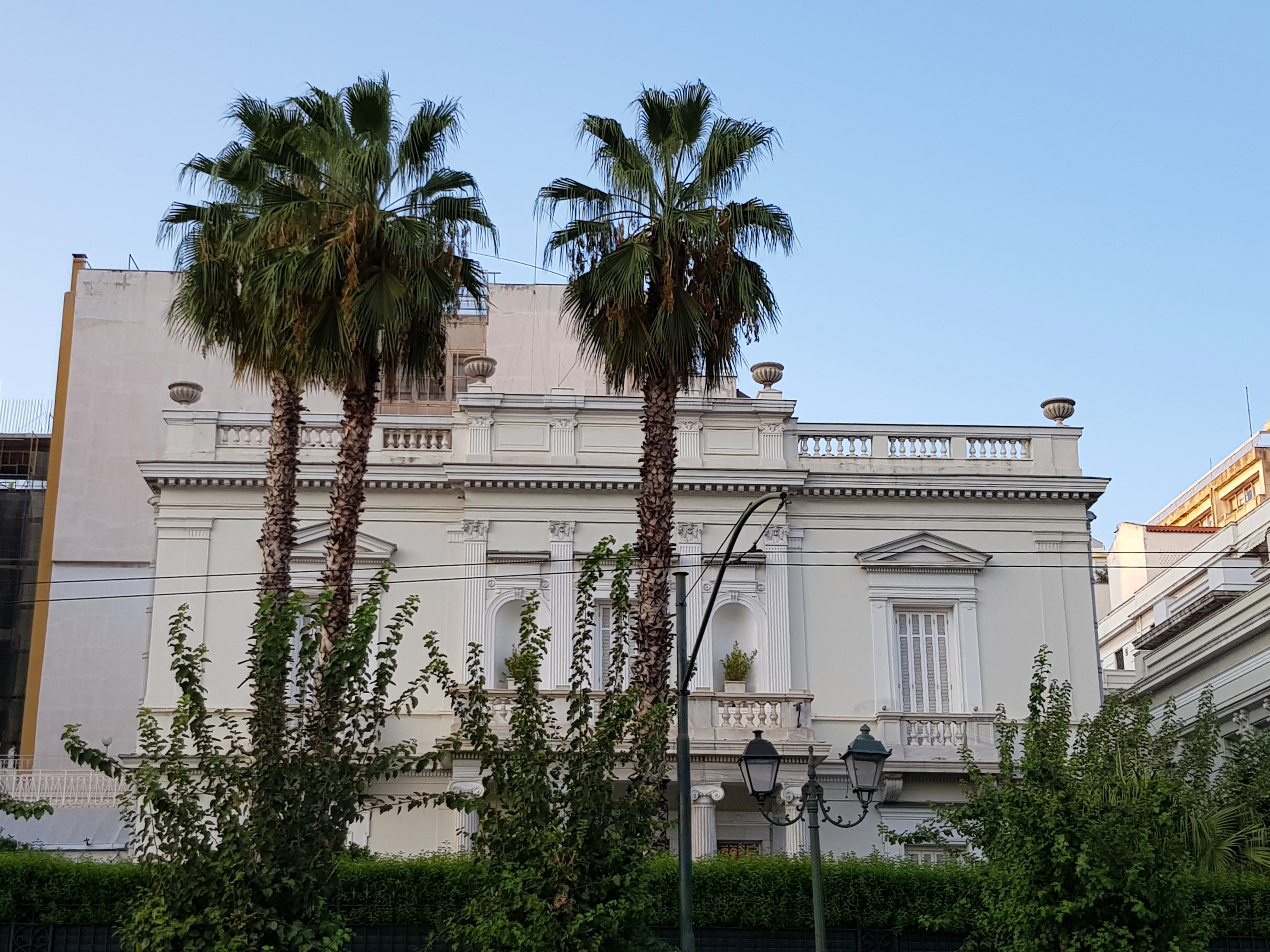 Αιγυπτιακή Πρεσβεία«Αιγυπτιακή Πρεσβεία»